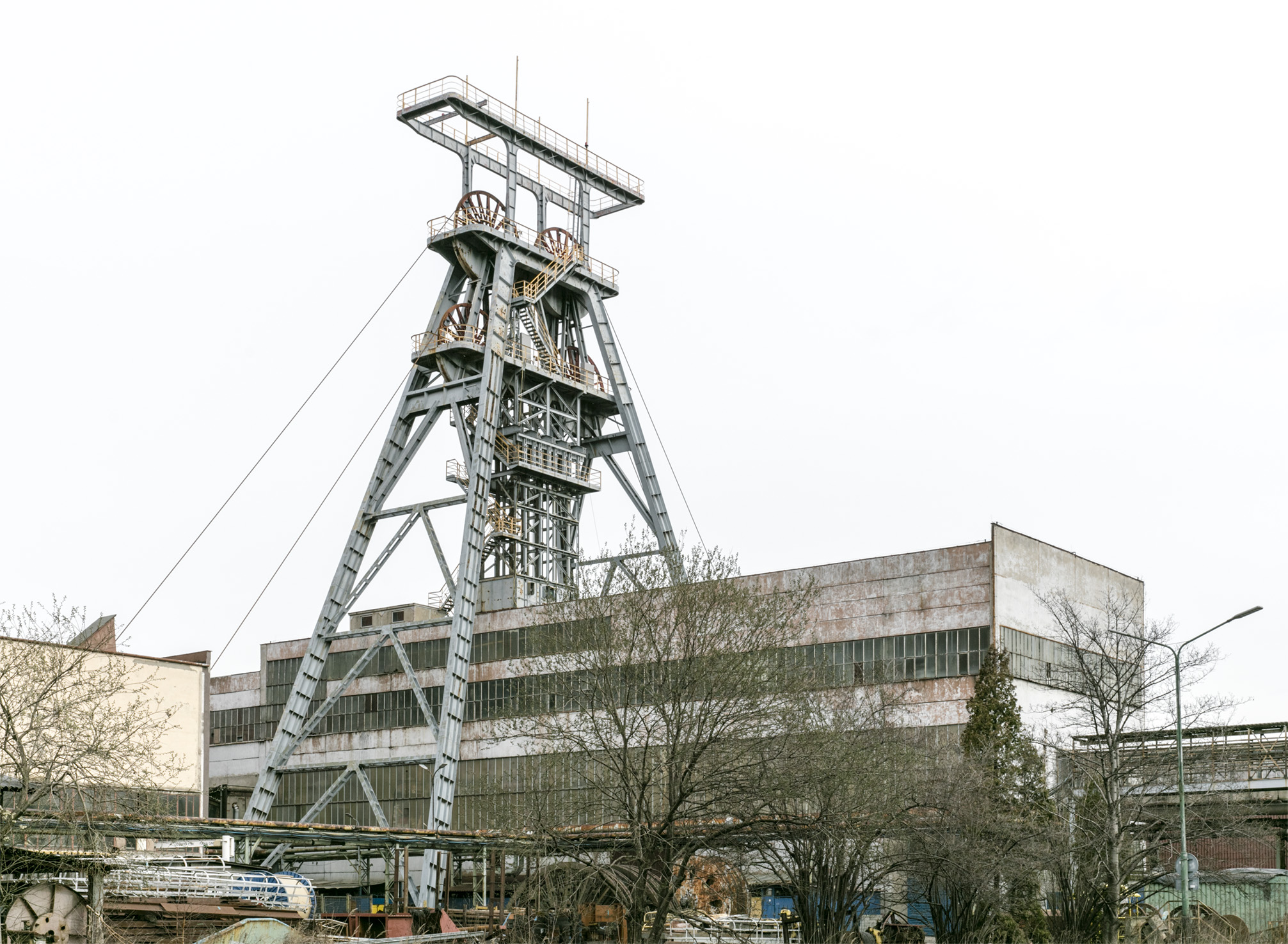 Berrgwerk Staszic Gerüst über Schacht 2